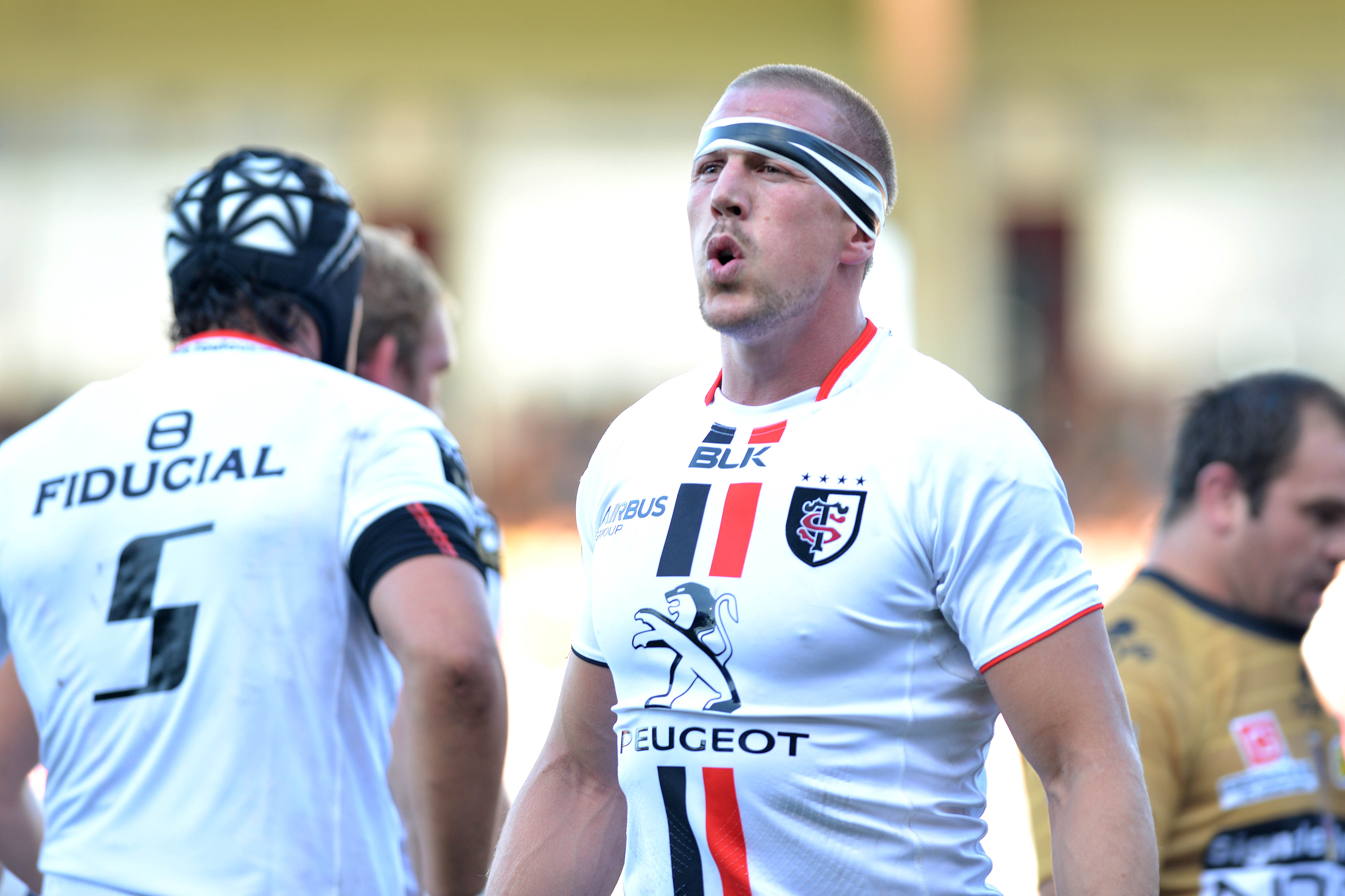 photo match